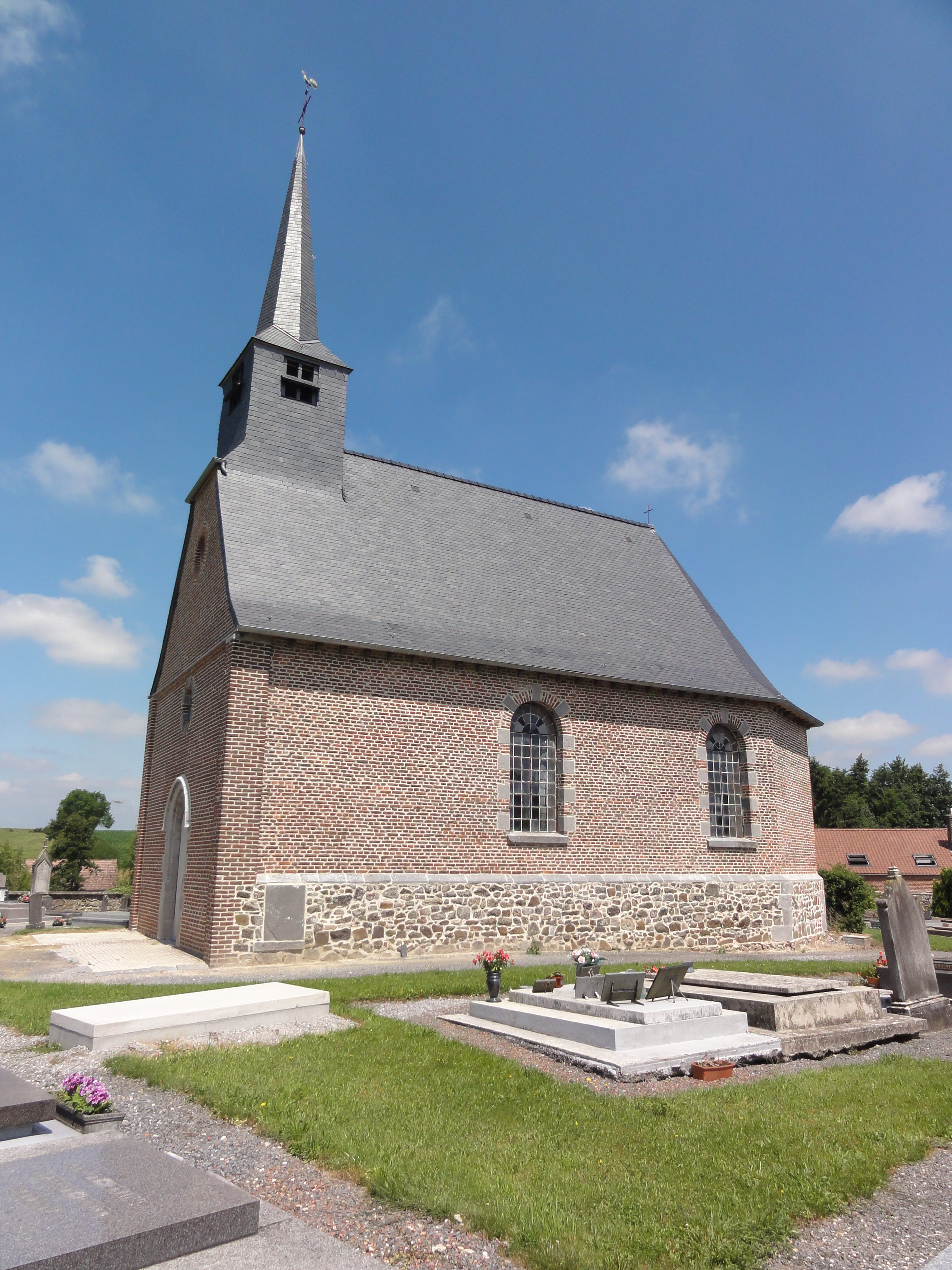 Bersillies (Nord, Fr) église, vue latérale.